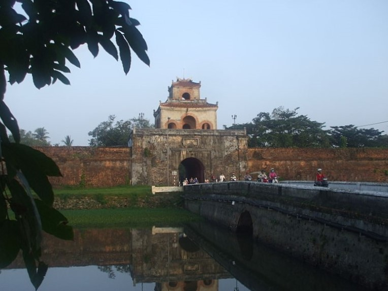 Cửa Thượng Tứ của kinh thành Huế, Việt Nam.